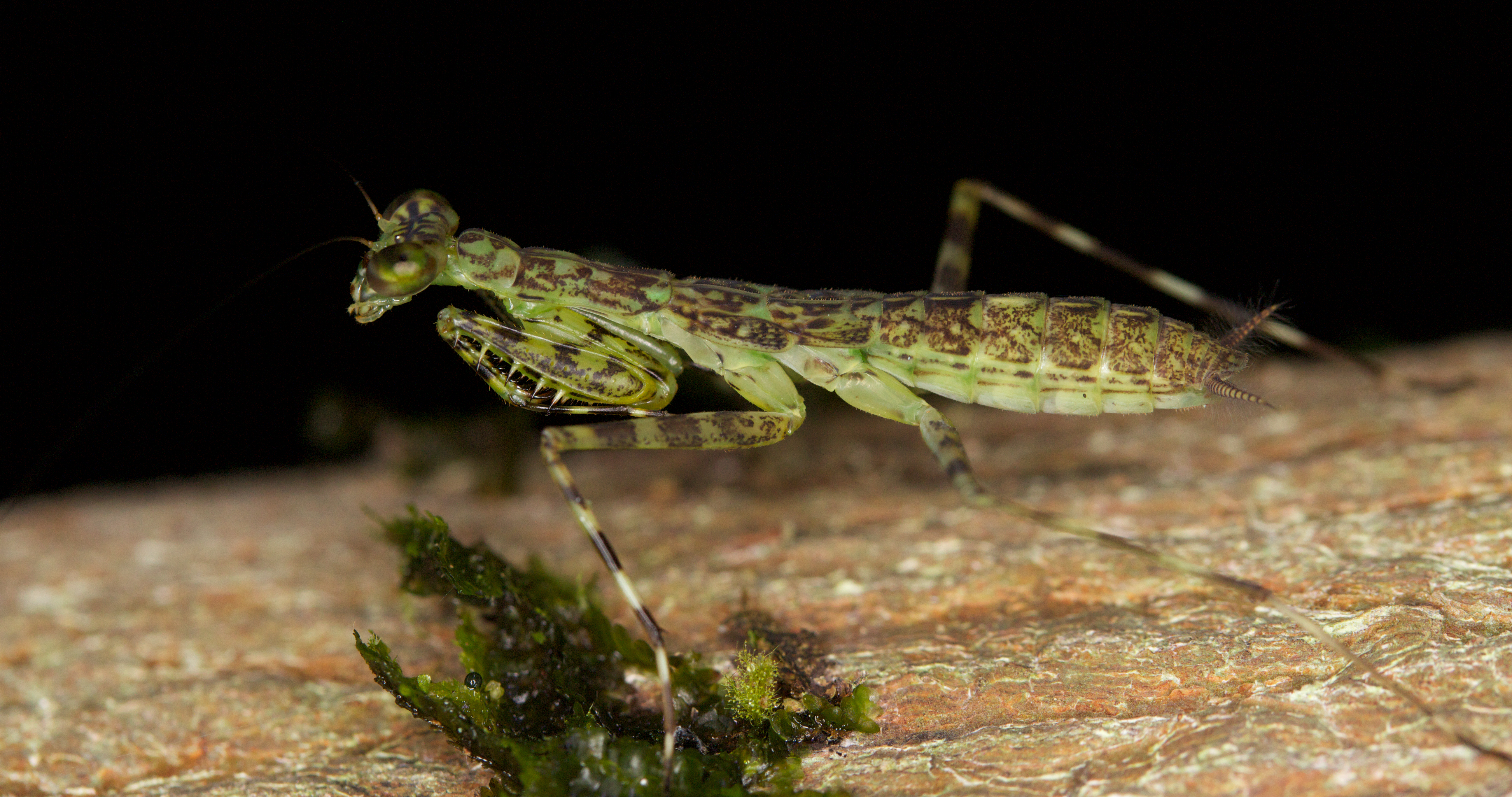 Bark mantis